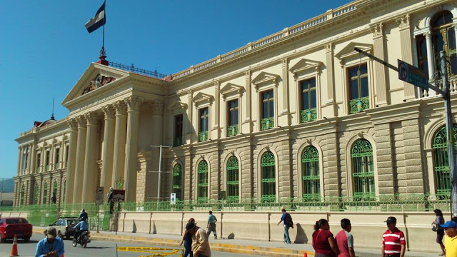 Vista panorámica del Palacio Nacional circa (2019)